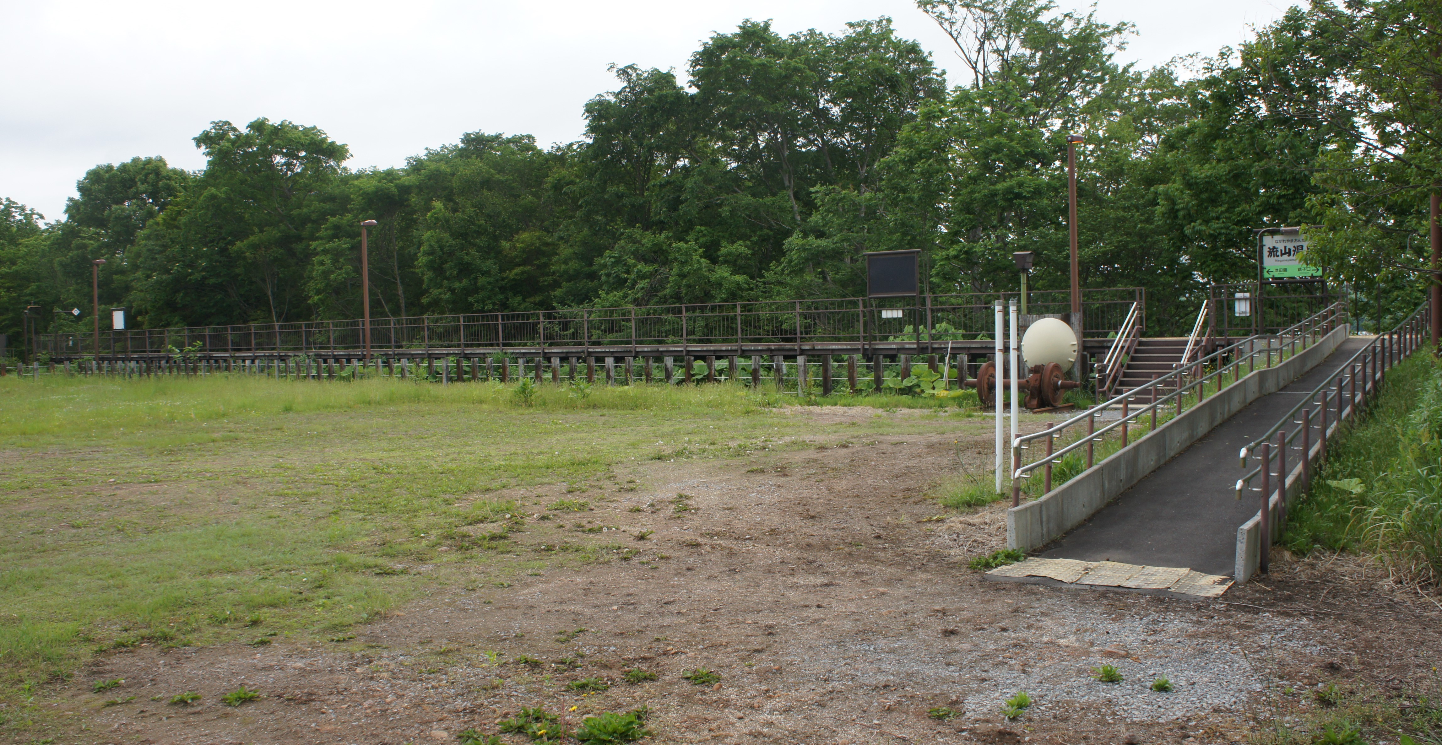 JR函館本線・流山温泉駅全景